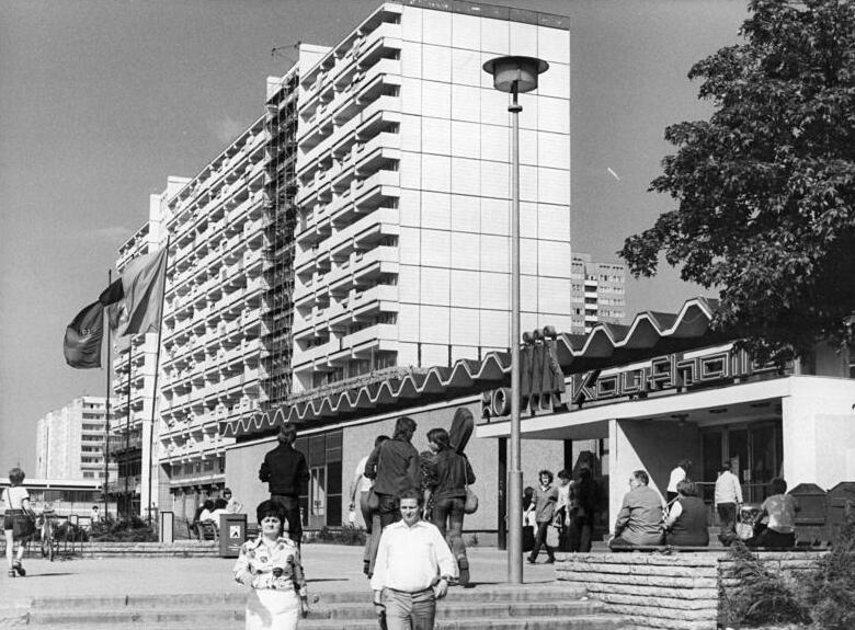 Berlin, Greifswalder Straße, Wohnhochhaus, HO-Warenhaus ADN-ZB Schneider 28.5.79-po-Berlin: Neue Wohnhäuser und eine Kaufhalle sind an der Greifswalder Straße entstanden.